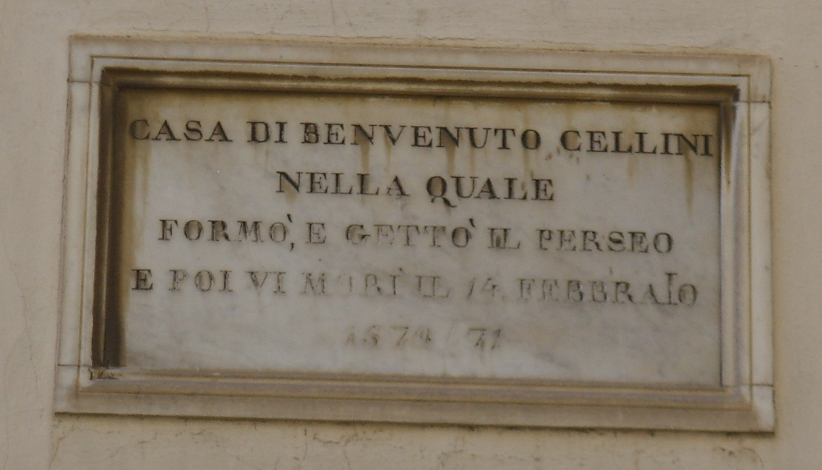 Targa casa di benvenuto cellini, via della pergola